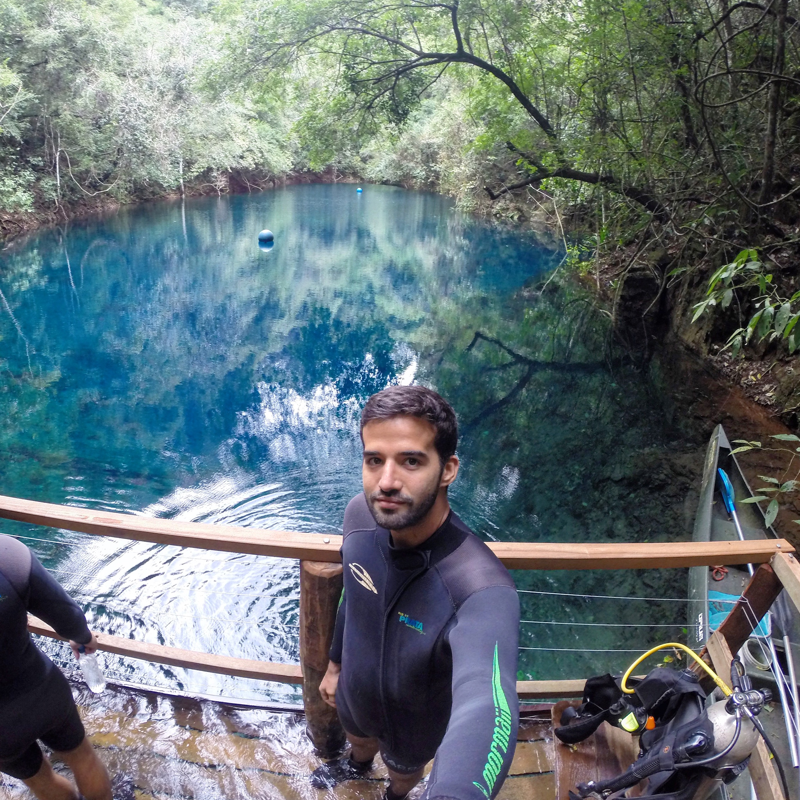 Azul que não acaba nunca!